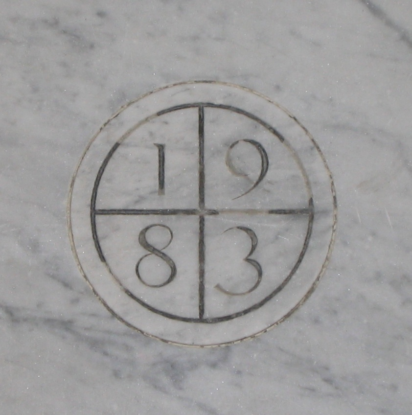 Bodenmarkierung im Dom St. Blasien